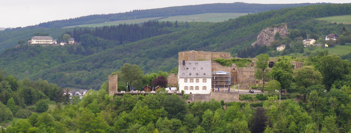 Kyrburg über Kirn, Steinkallenfels und Schloss Wartenstein im Hintergrund